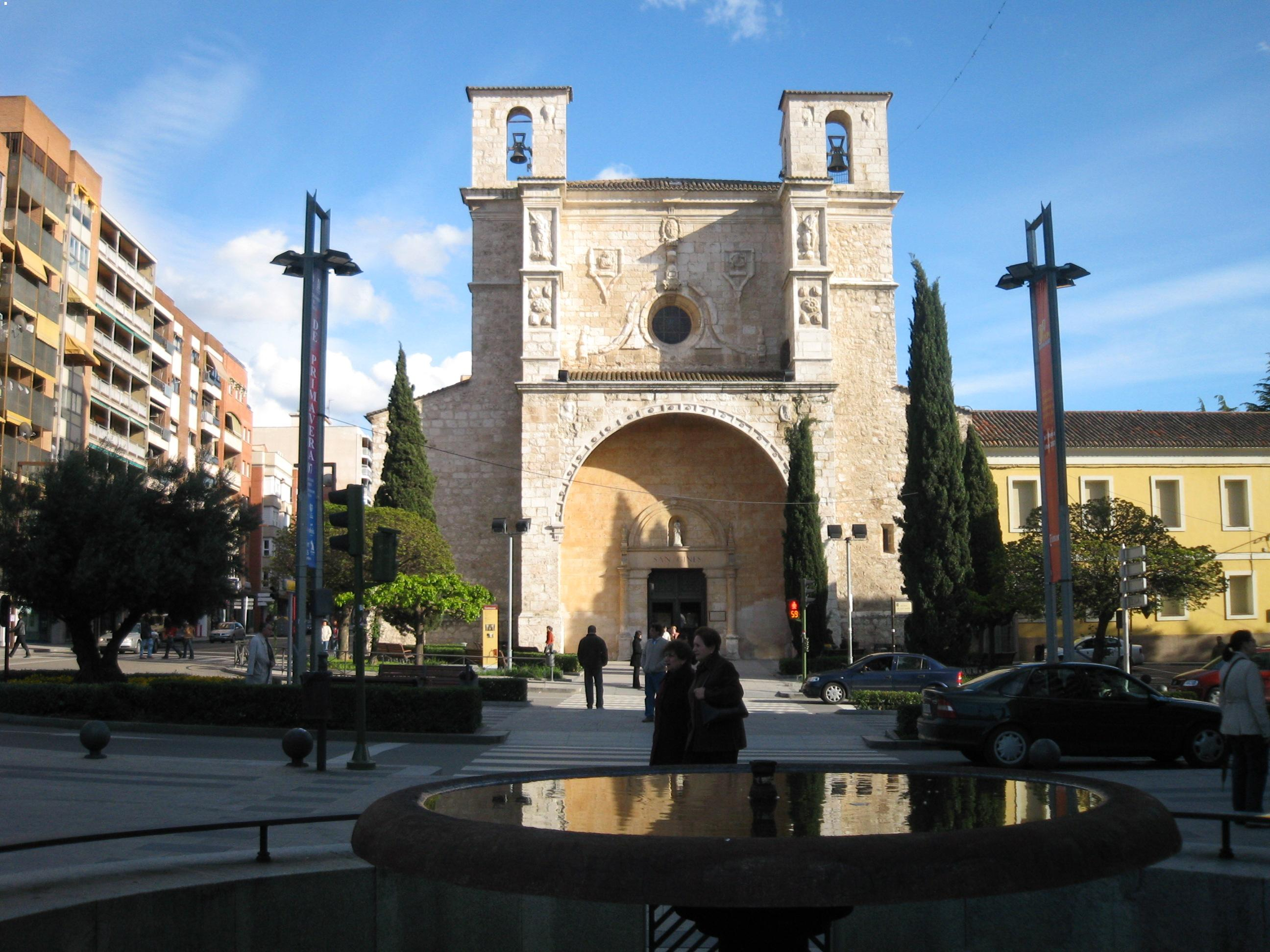 Iglesia de San Ginés in Guadalajara, Spain